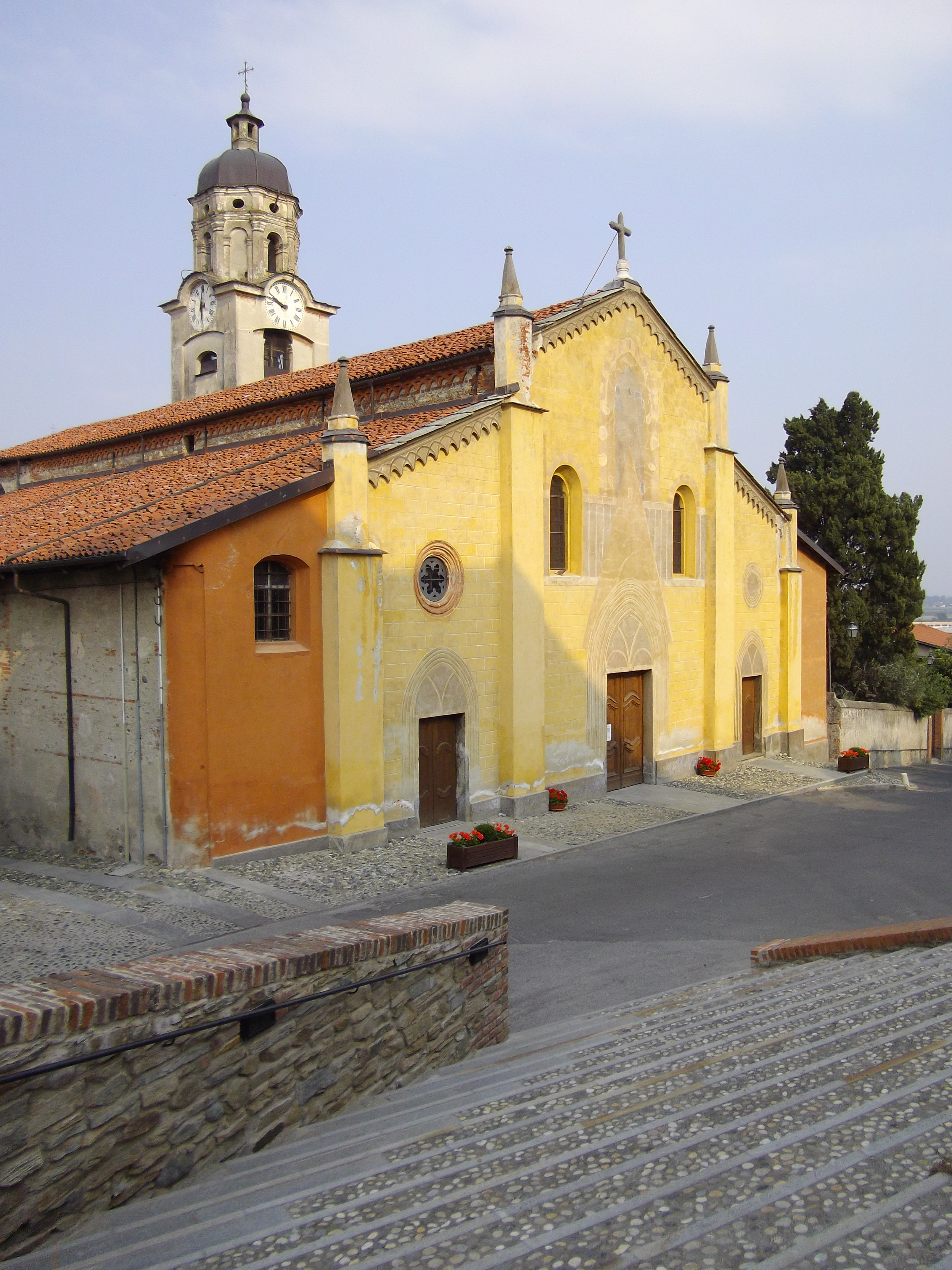 Piemontèis: La Ciesa 'd Costiòle